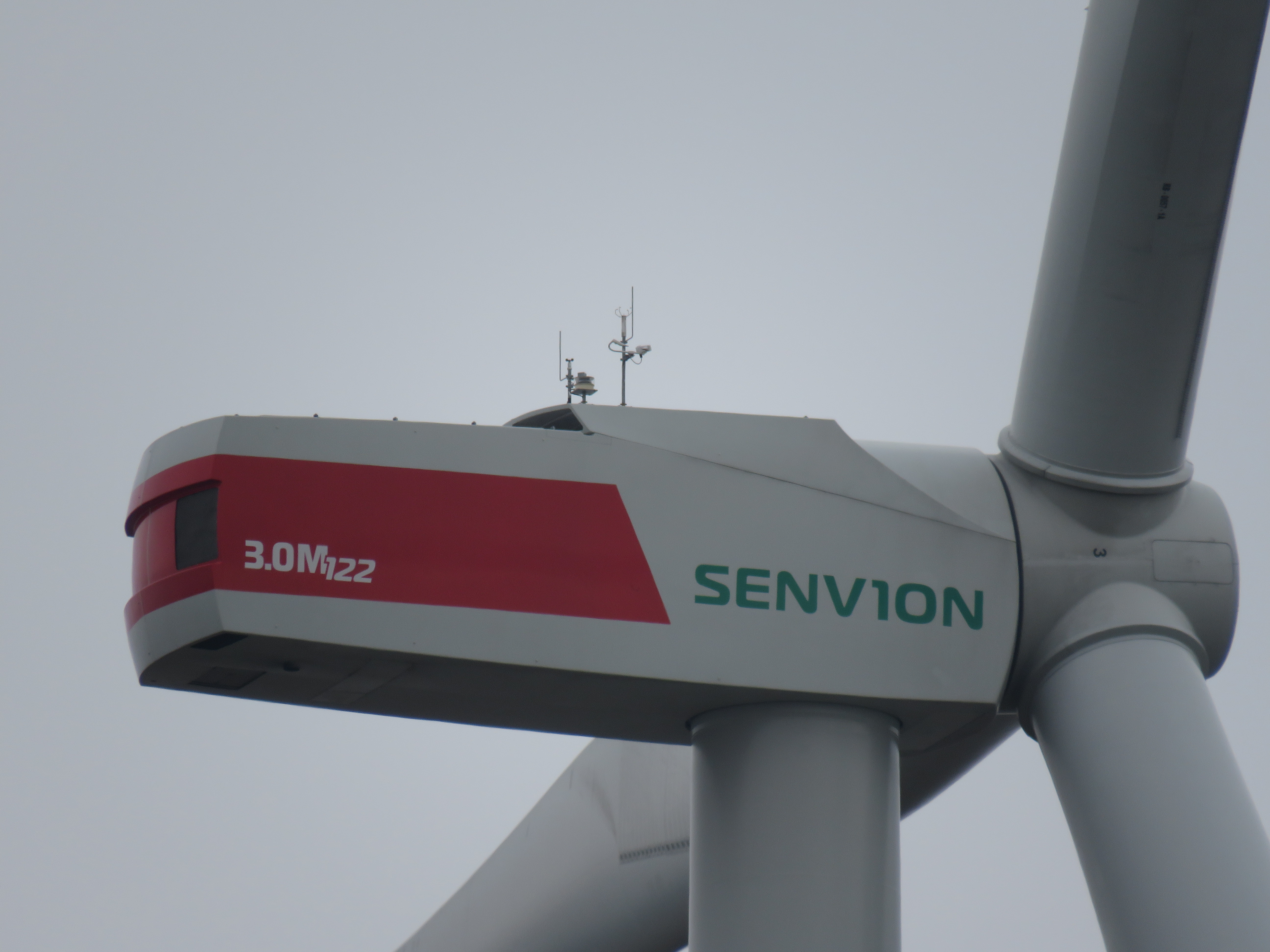 Gondel einer Windkraftanlage des Typs SENV1ON 3.0M122 im Windpark Eilerberg an der BAB 44